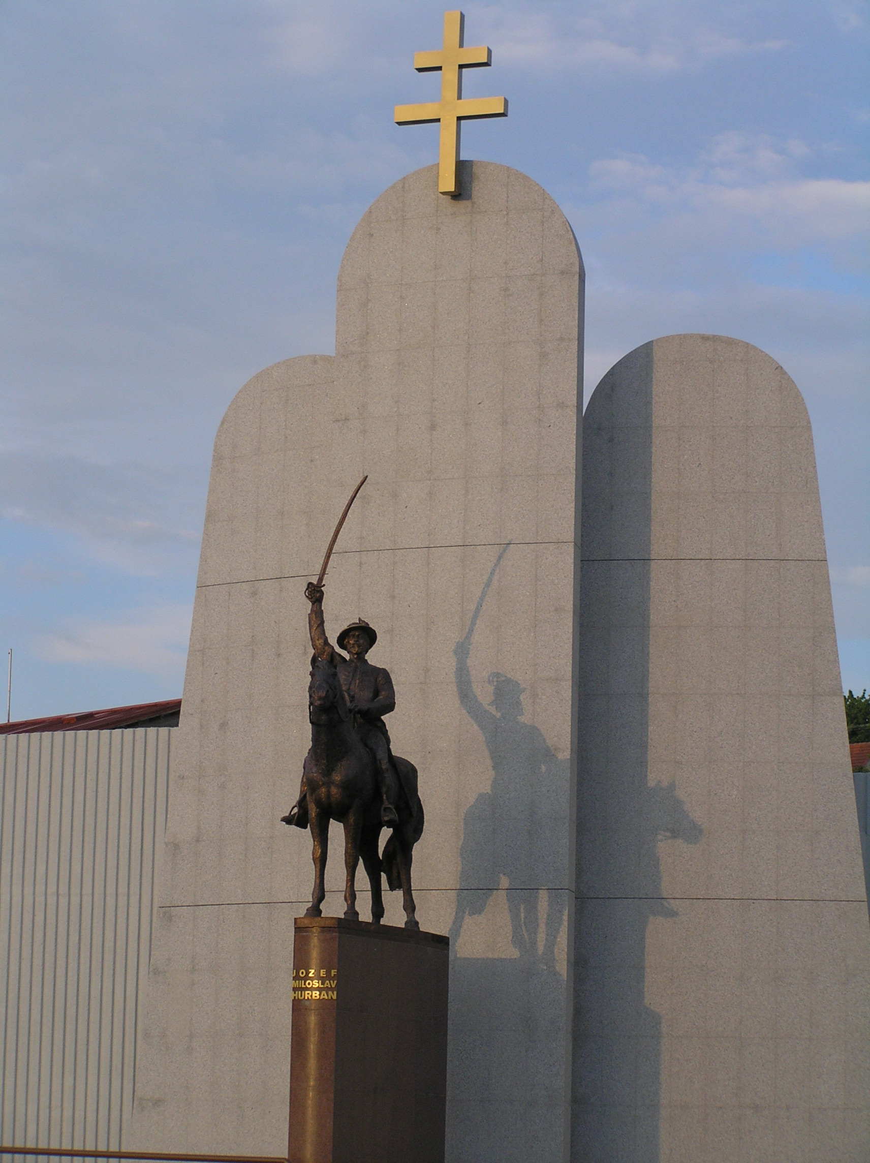 Pamätník Jozefa Miloslava Hurbana Budatín, Žilina